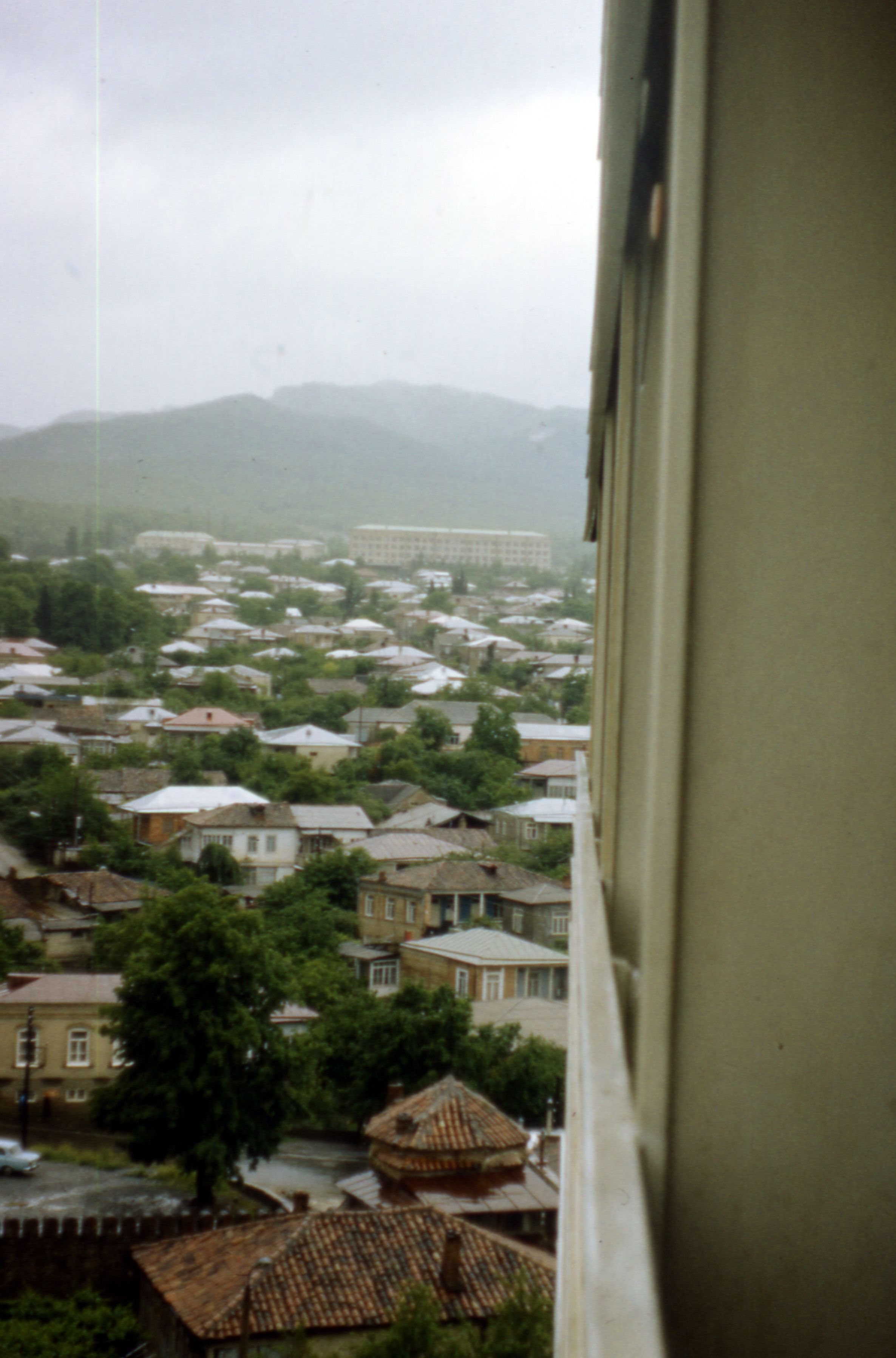 Aserbaidschan 1987